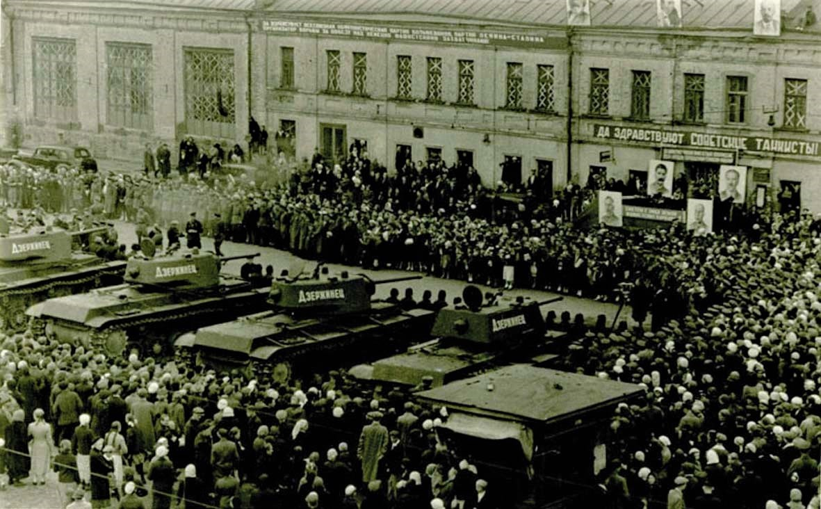 Москва прифронтовая. Торжественный митинг по случаю передачи танковой колонны "Дзержинец" , построенной на средства, собранные жителями Дзержинского района г. Москвы, для Красной Армии. 30 июня 1942 г. сообщение в газете «Московский большевик». В Москве состоялась торжественная передача представителям действующей армии колонны тяжелых танков KB, построенных на средства трудящихся Дзержинского района. На каждом из пяти передаваемых танков сделана надпись «Дзержинец». Танки были переданы в 475-й отдельной танковый батальон. Танковой ротой командовал Герой Советского Союза Андрей Михайлович Серебряков